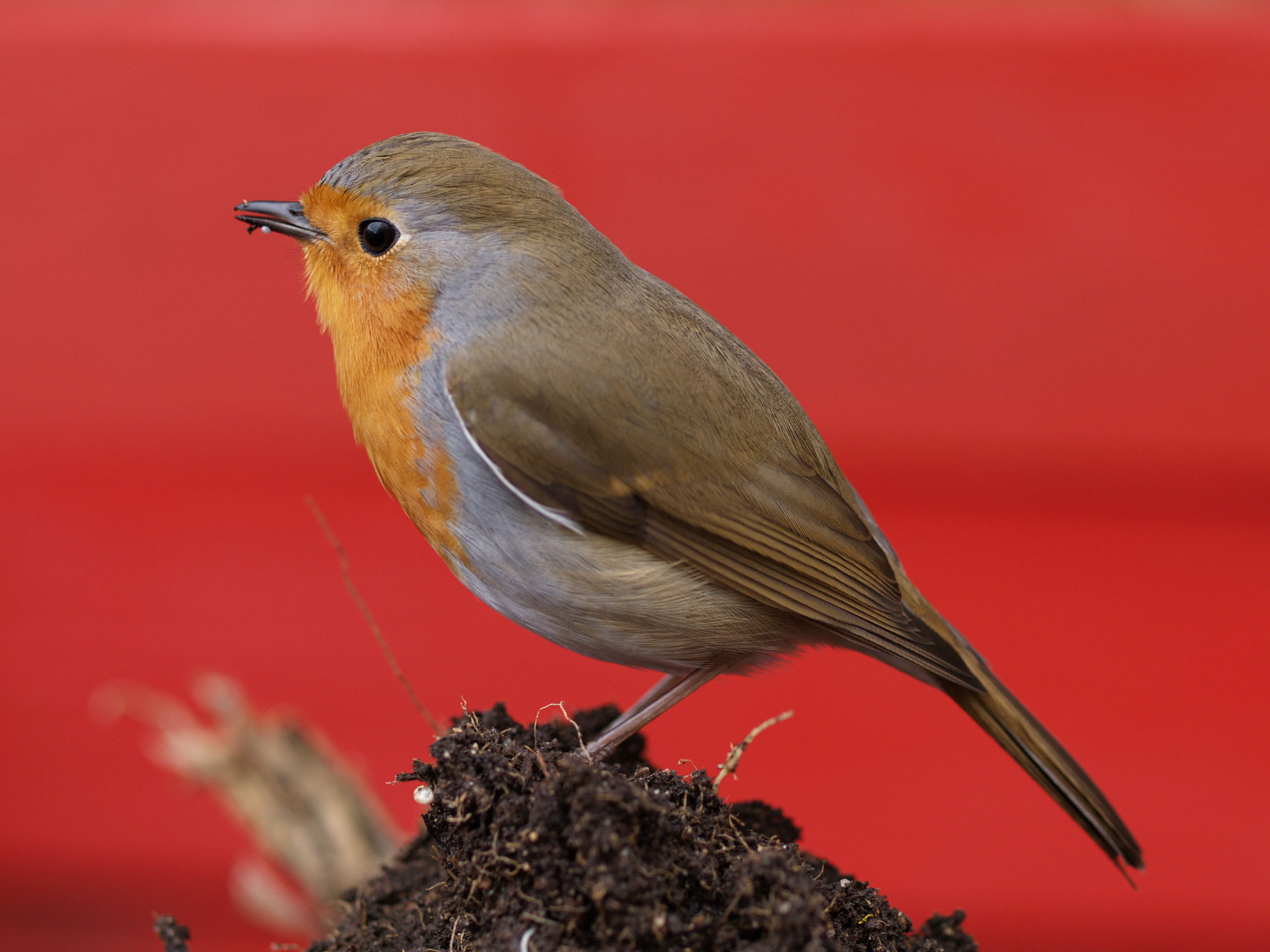 European Robin (Erithacus rubecula, cat.)